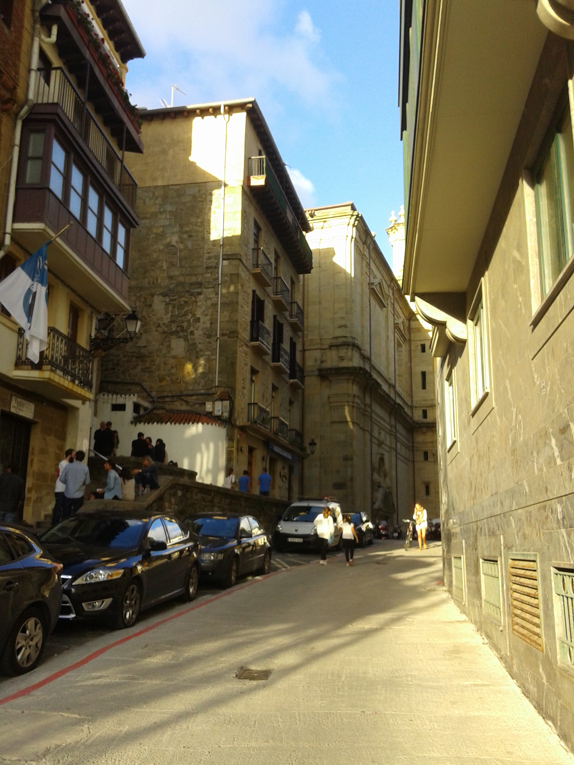 Koruko Andre Mariaren kalea.